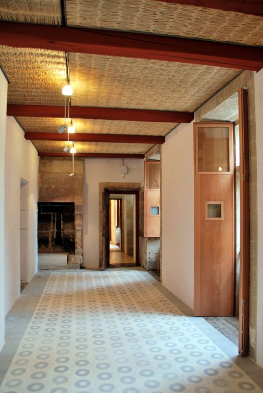 Interior de la Casa del Cabildo después de la intervención de restauración llevada a Cabo por el Consorcio de Santiago.